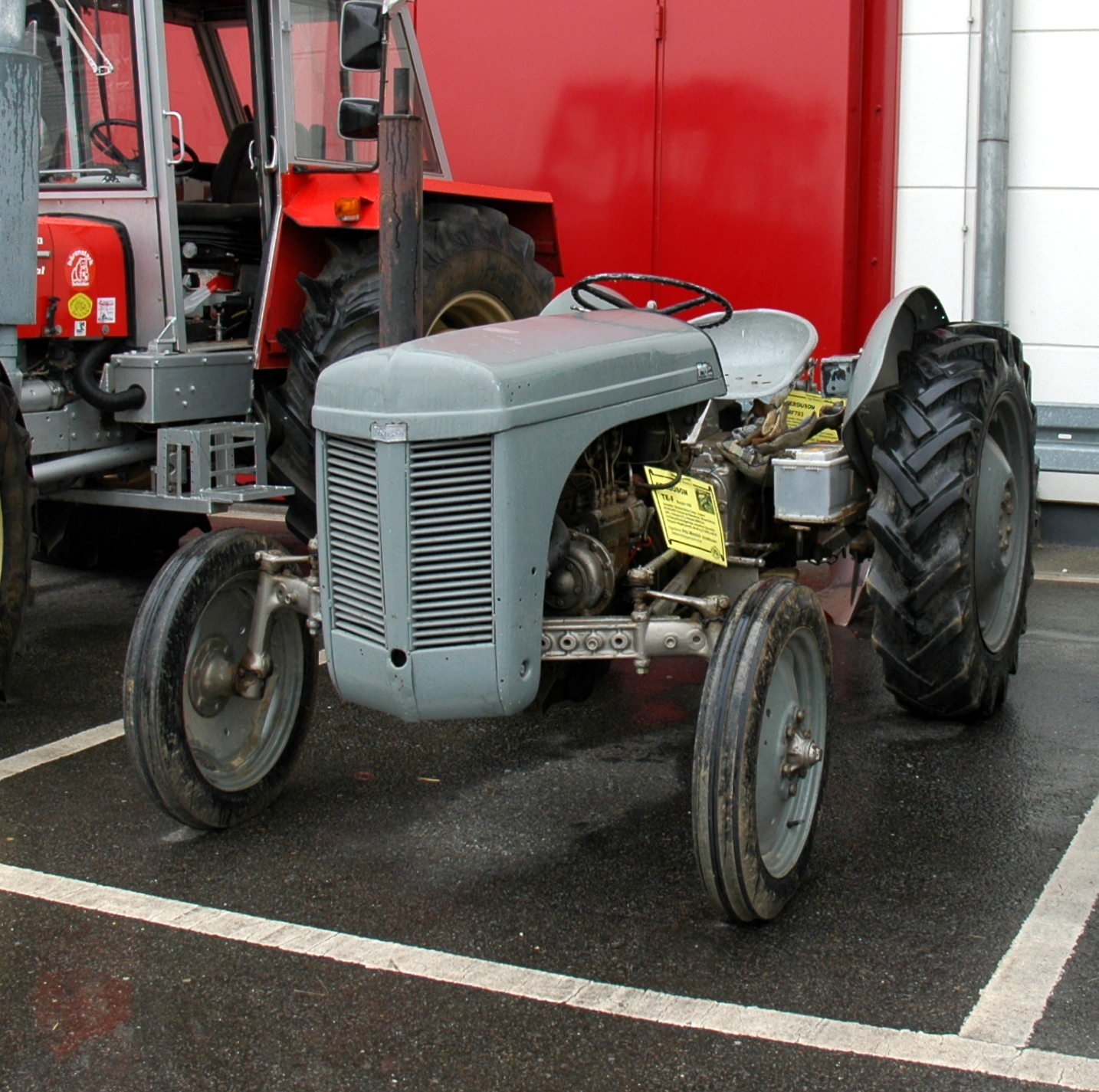 Siensheim Agri Historica 2015: Massey Ferguson TEF